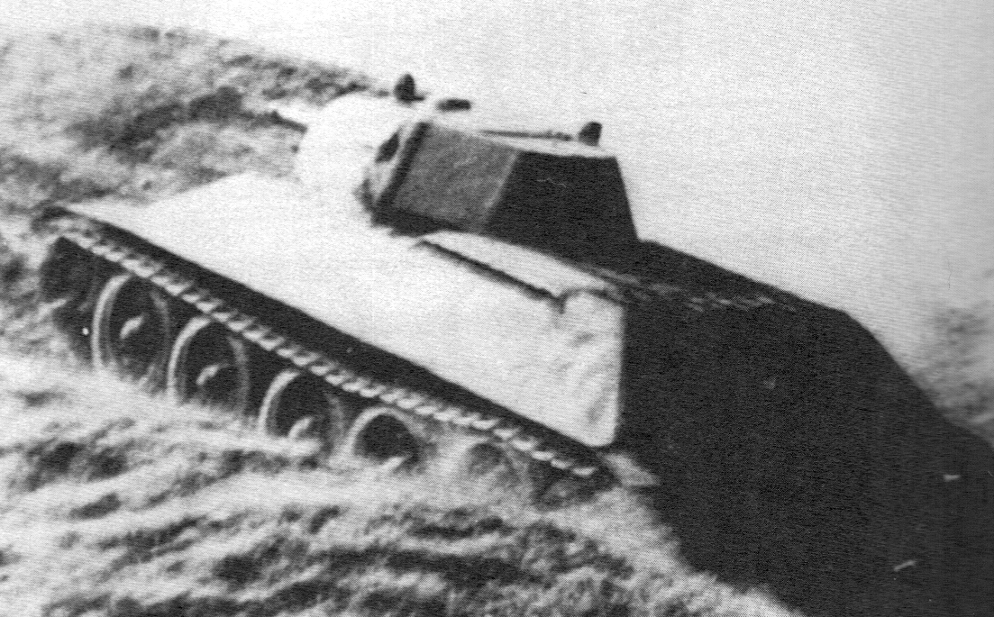 蘇聯的A-20式坦克